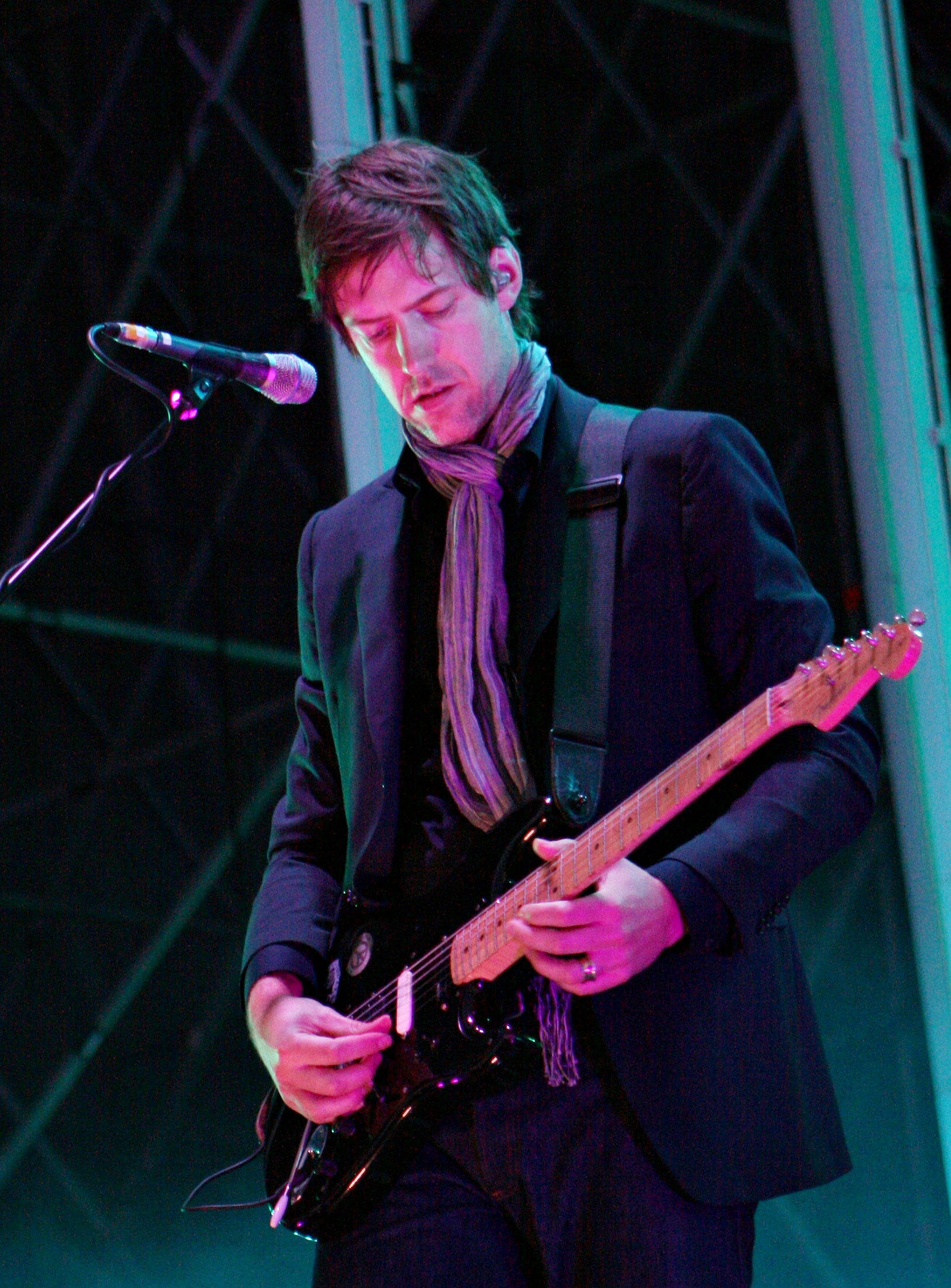 Ed O'Brien con Radiohead en el Daydream Festival que se celebró en Barcelona el 12 de junio de 2008.